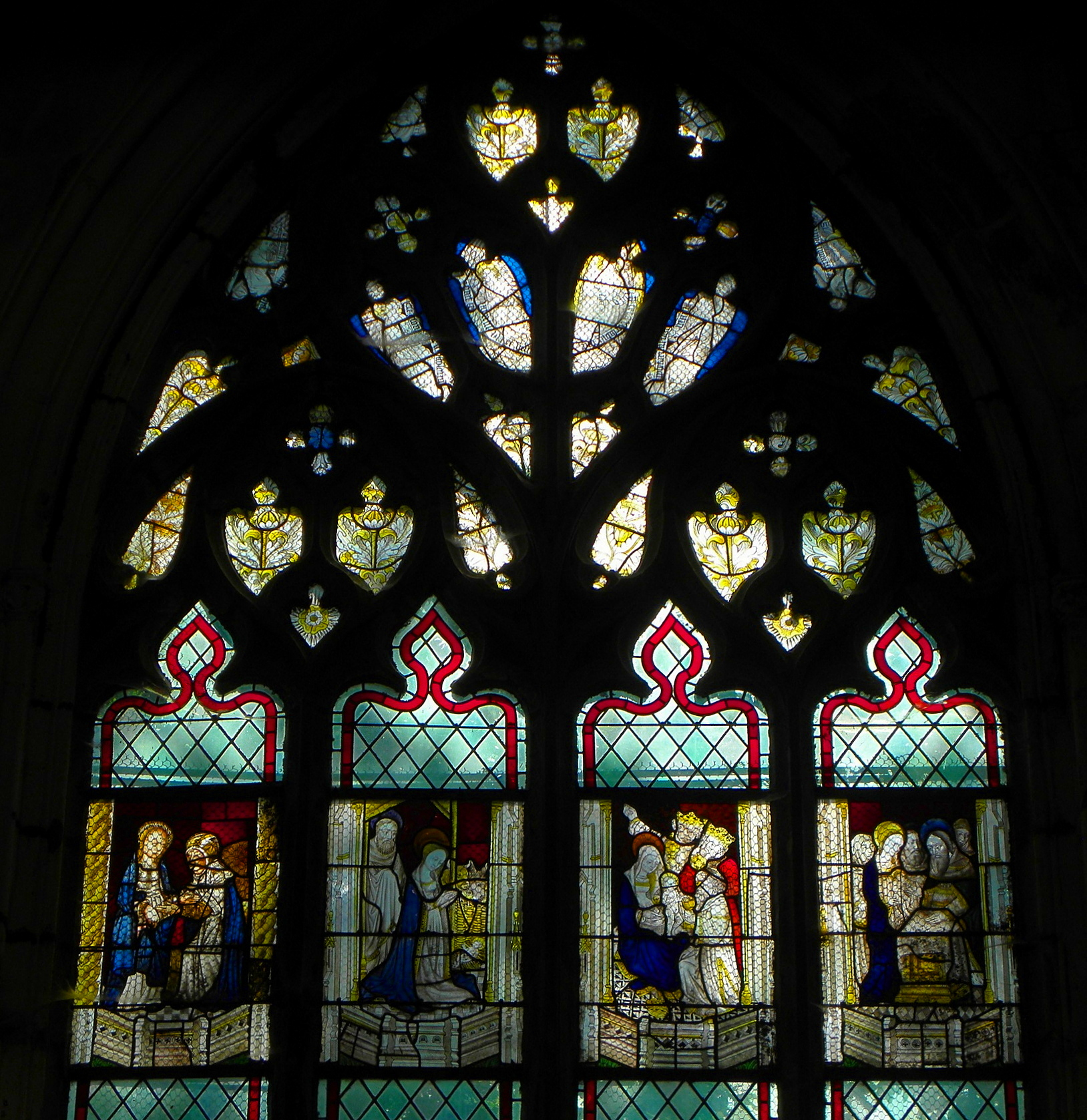 4ème registre et tympan de la maîtresse-vitre de la chapelle Notre-Dame de Kerfons en Kerfaouës sise commune de Ploubezre (22).